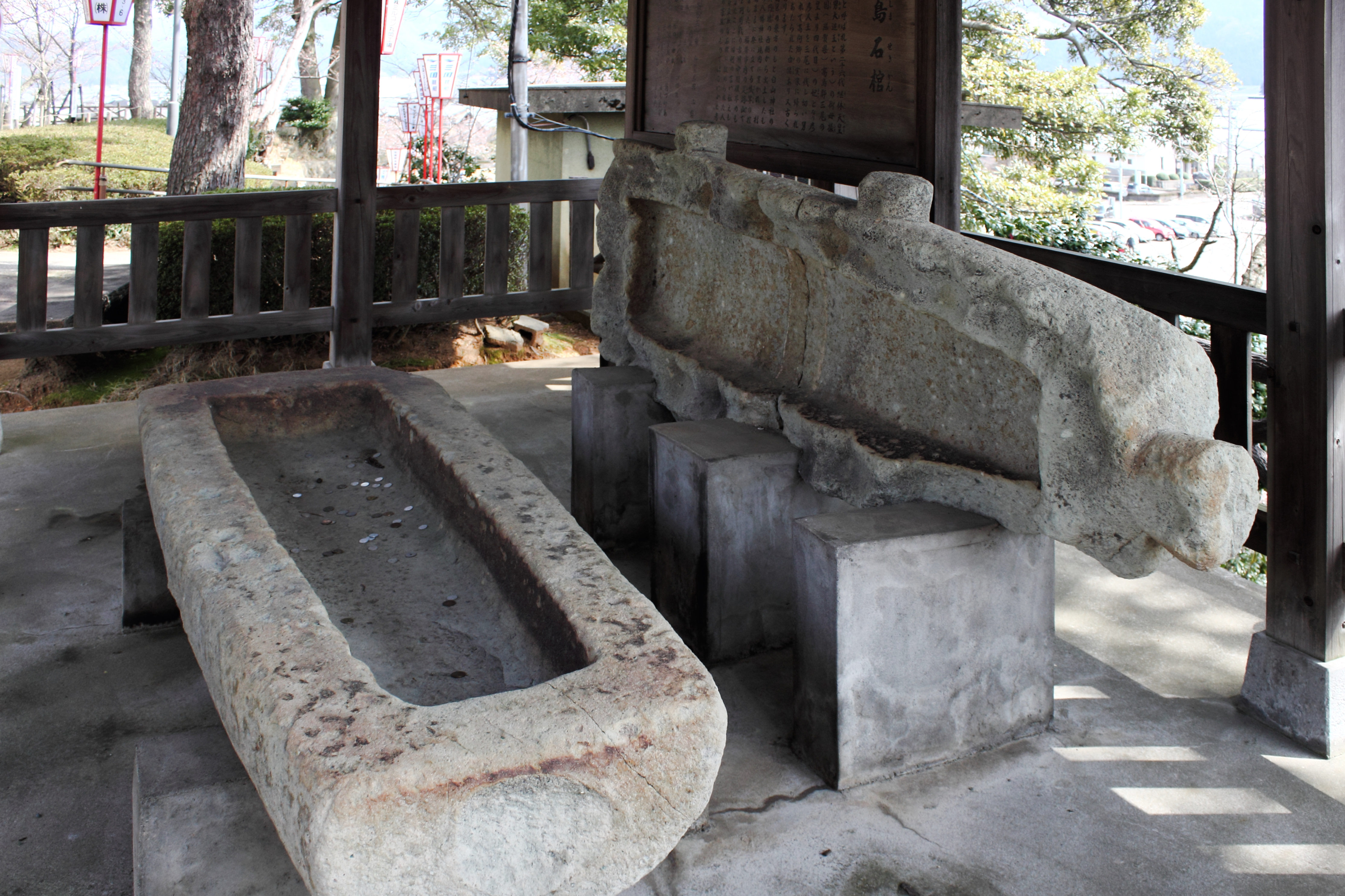 笏谷石で造られた石棺 坂井市牛ヶ島区の東方のもと白山神社のスギ林の中にあった円墳から出土したものと言われている